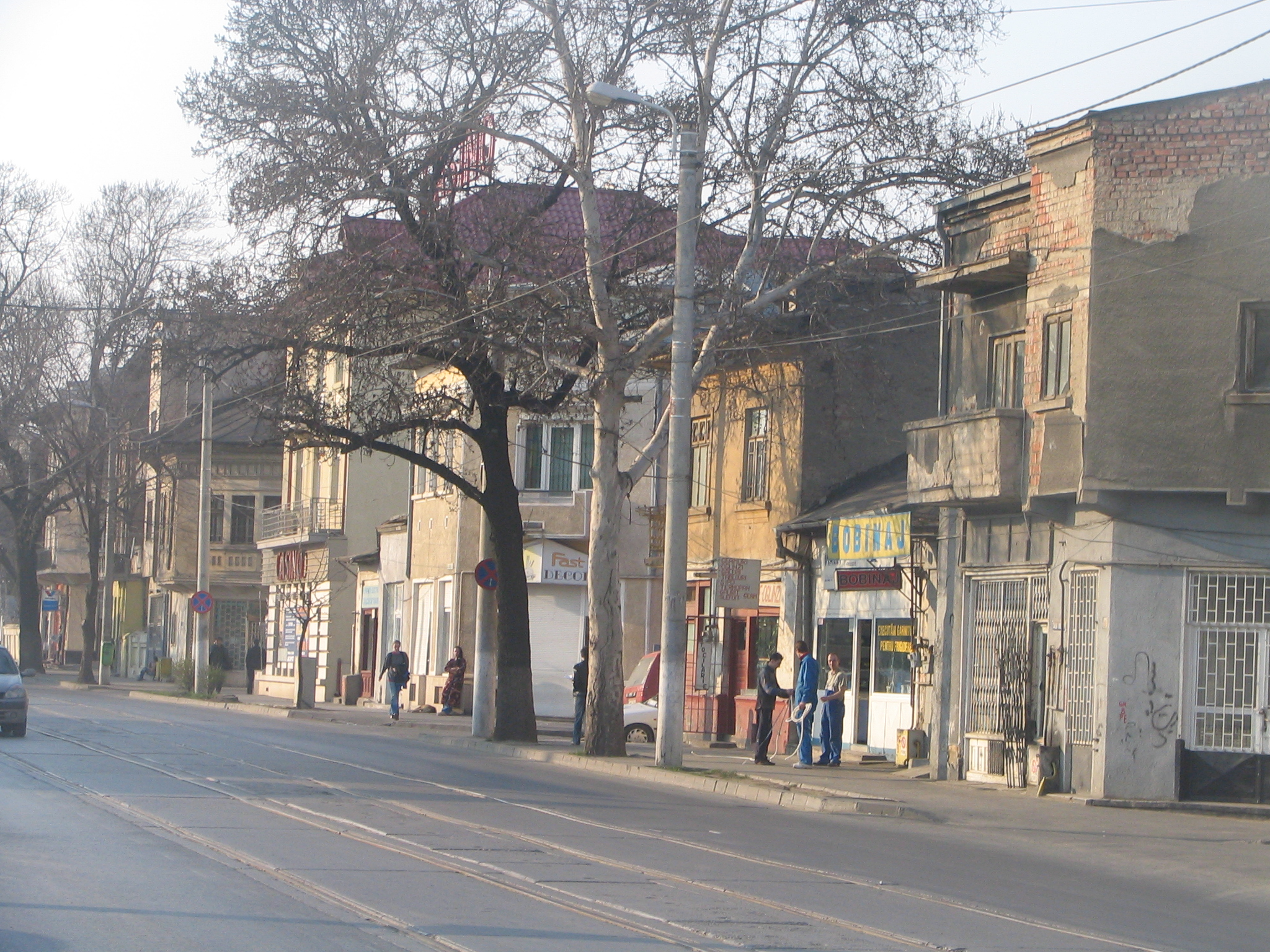 Dudești neighbourhood, București